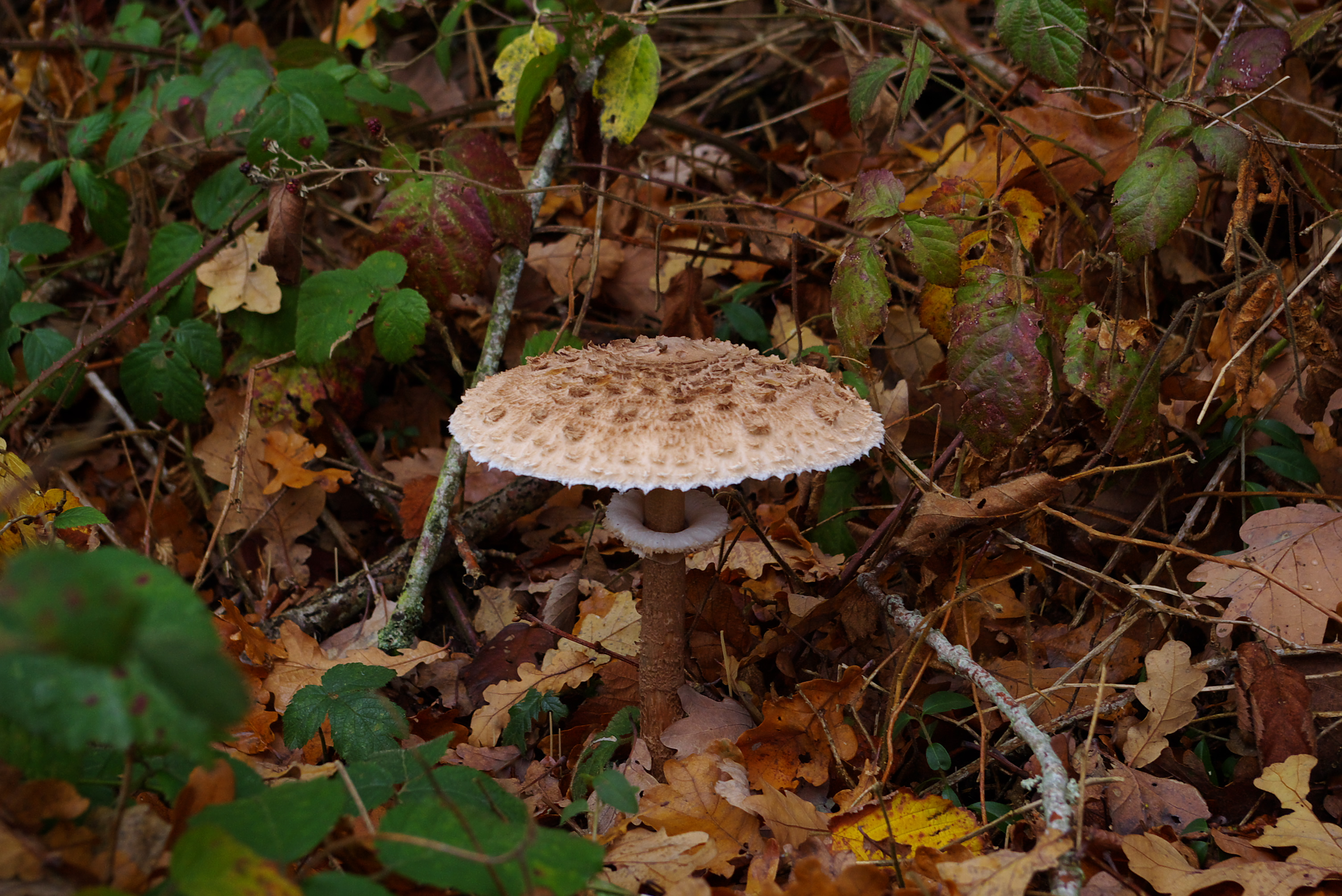 Lépiote en sous-bois